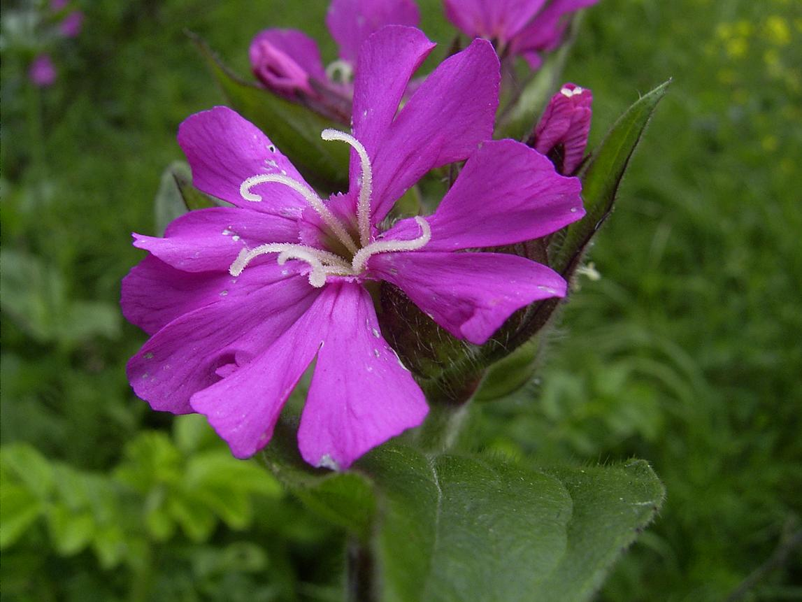 Silene dioica